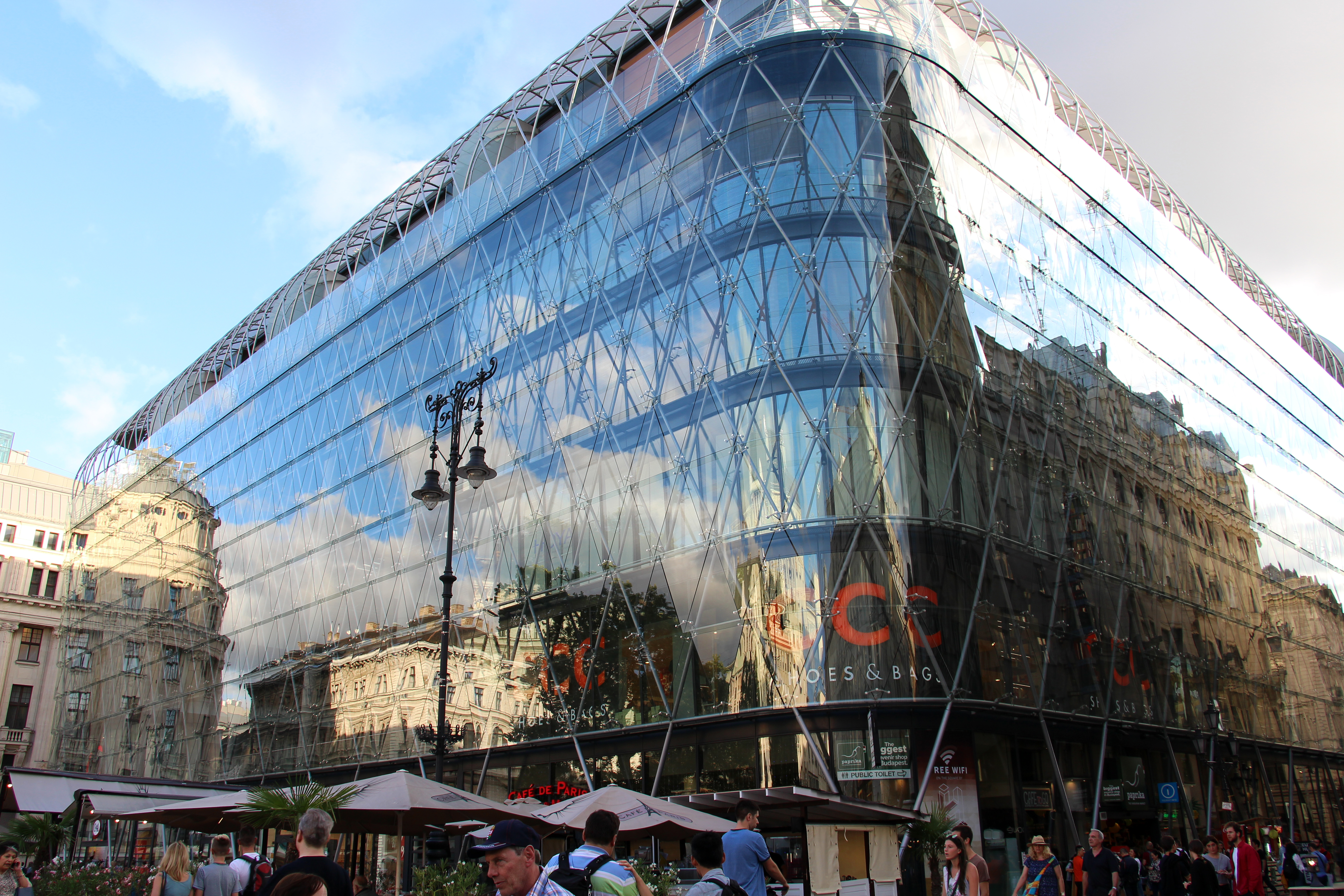 Lipótváros - Vörösmarty tér Business center. Arch. György Fazakas and Jean-Paul Viguier 2004-07